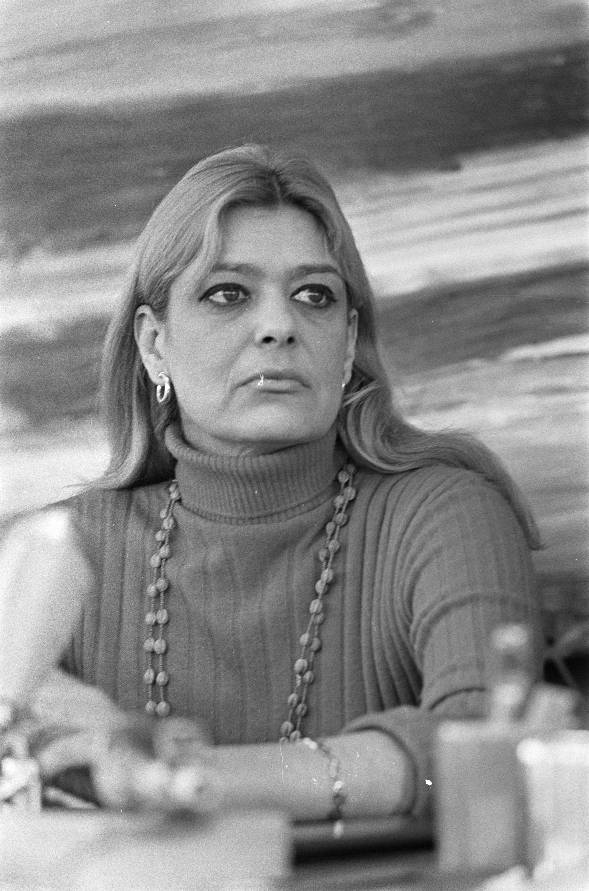 Collectie / Archief : Fotocollectie Anefo Reportage / Serie : [ onbekend ] Beschrijving : Aankomst Melina Mercouri . Melina Mercouri tijdens de persconferentie Datum : 14 mei 1968 Trefwoorden : aankomsten, persconferenties Persoonsnaam : Mercouri, Melina Fotograaf : Nijs, Jac. de / Anefo Auteursrechthebbende : Nationaal Archief Materiaalsoort : Negatief (zwart/wit) Nummer archiefinventaris : bekijk toegang 2.24.01.05 Bestanddeelnummer : 921-3508